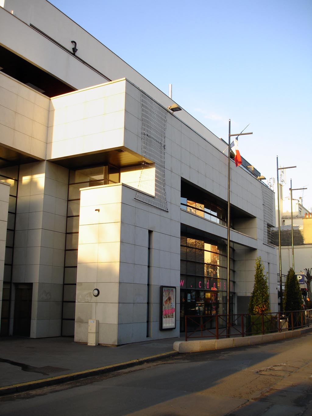 Le centre des Arts à Enghien-les-Bains (Val-d'Oise), France Décembre 2006 Photo personnelle (own work) de Clicsouris